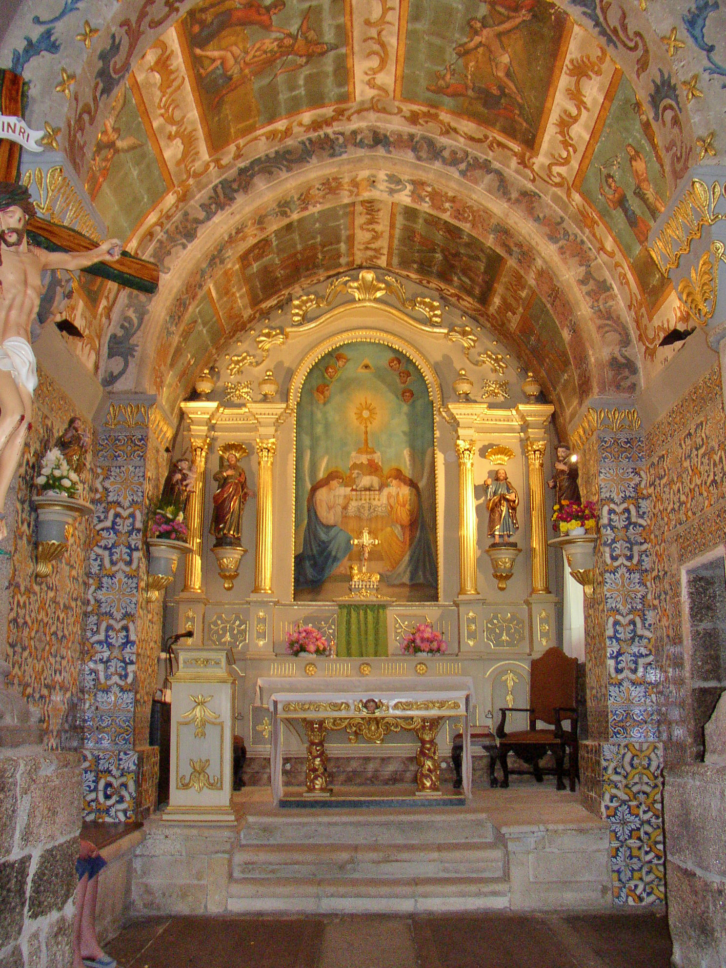 Interior da Igreja de Santo André (Vila Boa de Quires) This file was uploaded for Wiki Loves Monuments in Portugal with the unique identifier 70638.